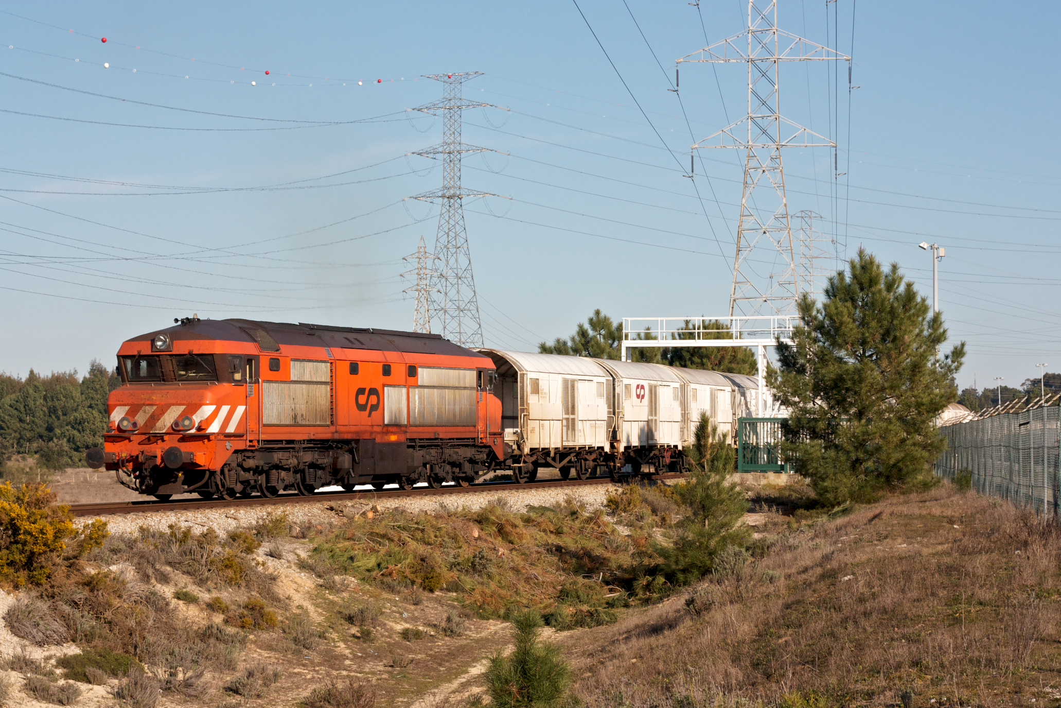 Tipo: Comboio de Transporte de Automóveis 69083 (material vazio) [Setúbal • Mar - Penalva] Local: Penalva [Ramal Autoeuropa, PK 28] Data e hora: 18 de Janeiro de 2012 [15h21] Material: Locomotiva 1913 + 18 vagões CP Hccerrs